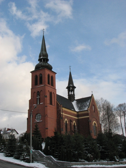 Fotografia przedstawia kościół parafialny w Gródku w Gminie Grybów